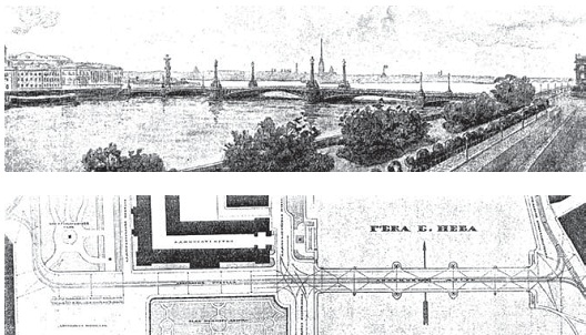 Эскизный проект внешнего вида Дворцового моста. Худ.-арх. Р. Ф. Мельцер. (Зодчий, 1915, №46)